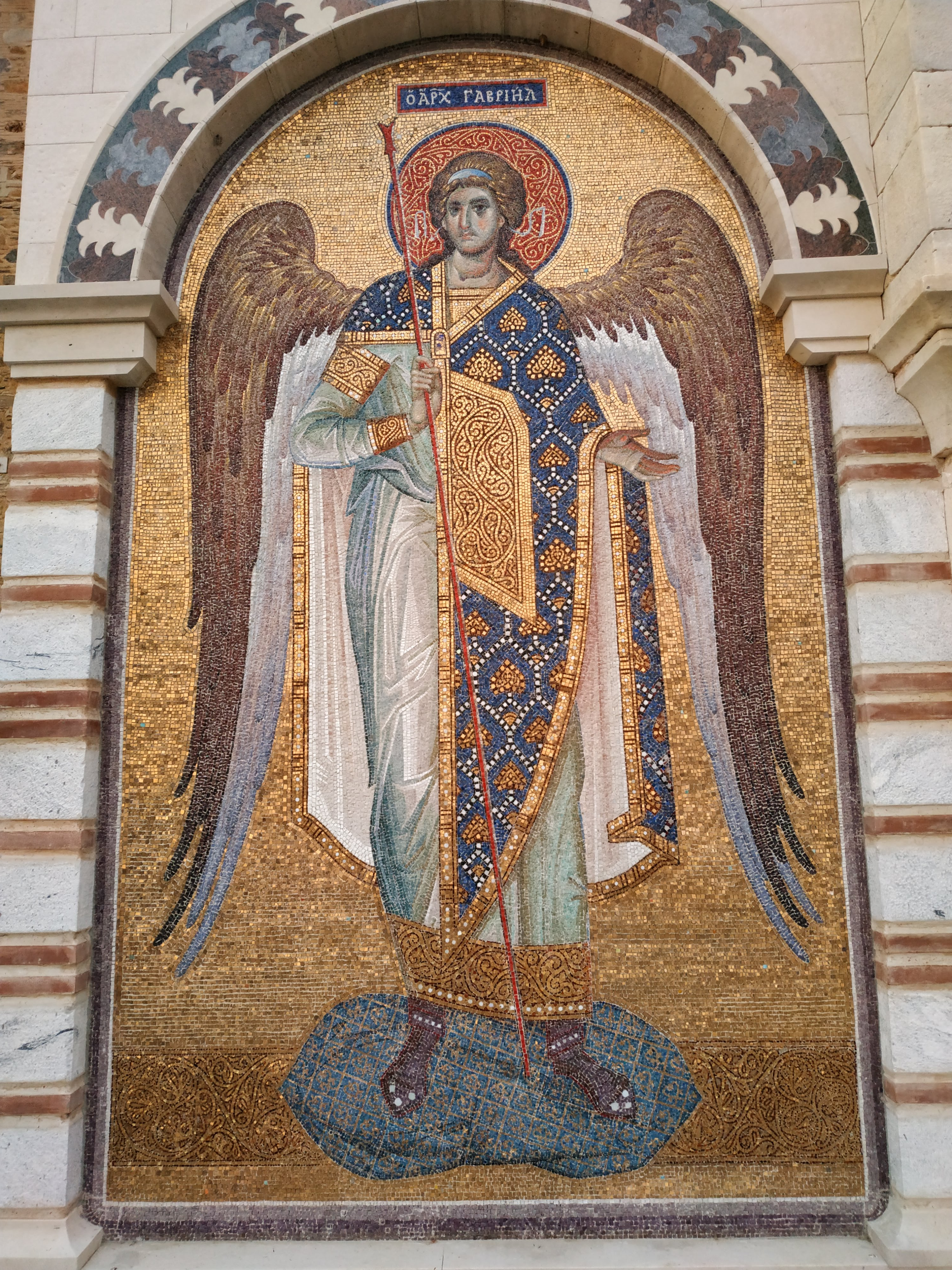 Архангел Гавриїл - фреска на осторові Афон. 2019